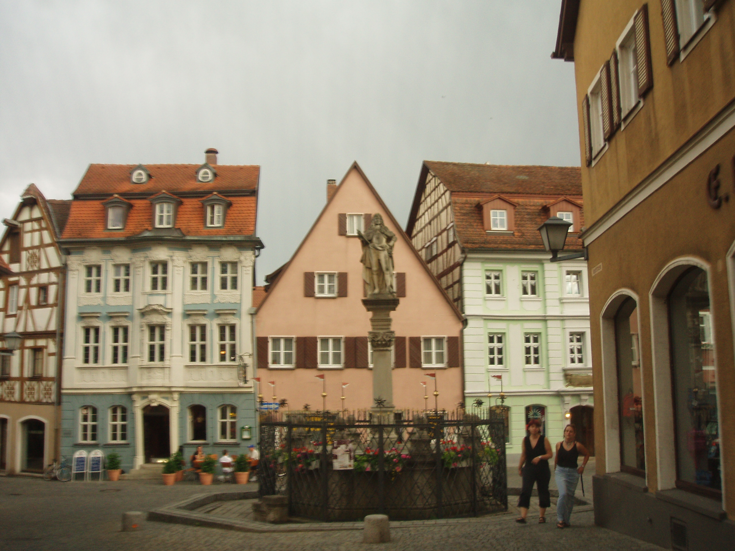 Bad Windsheim